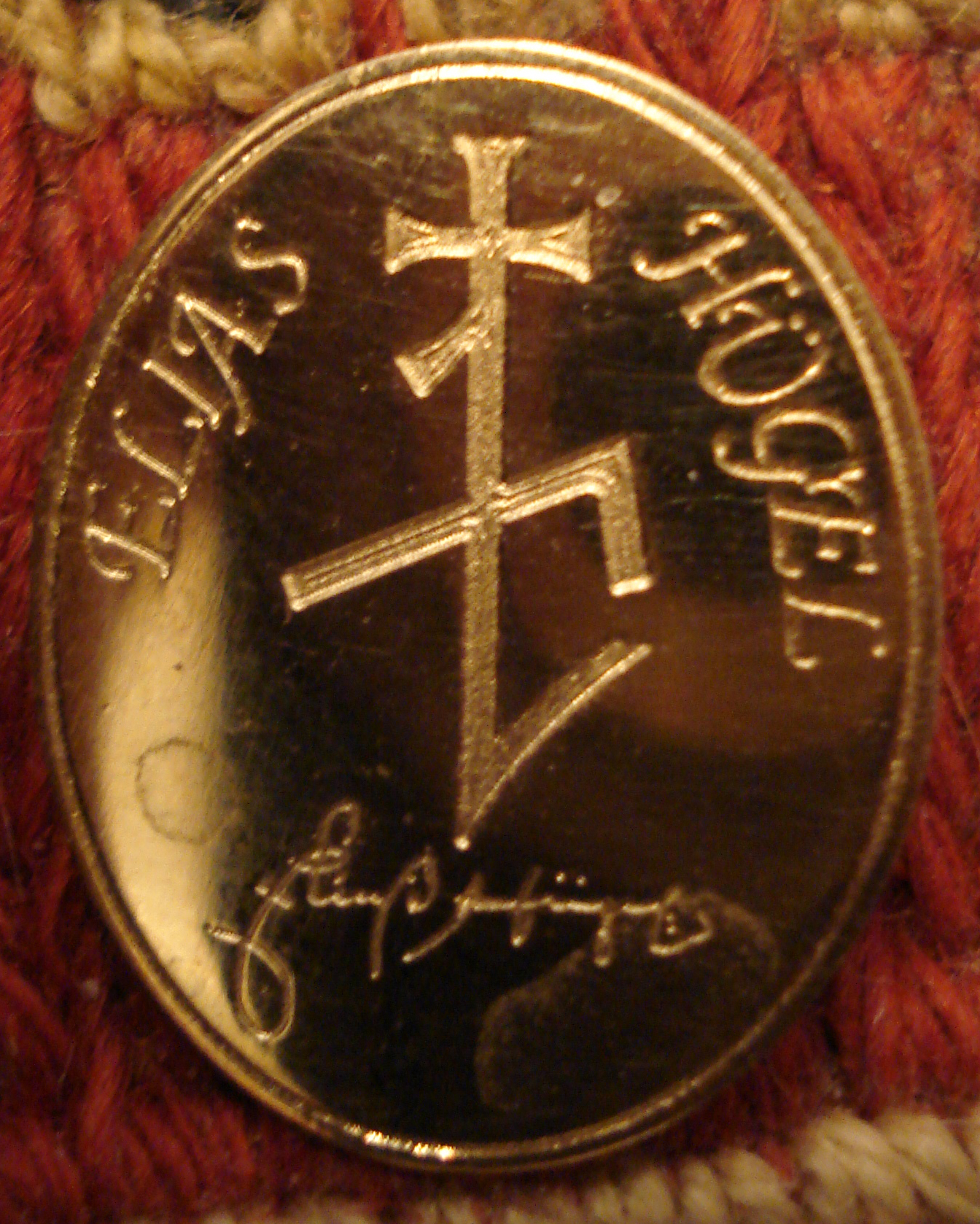 Dieses Elias Hügel-Ehrenzeichen (2,3 cm groß, Messing) überreichte der Obmann des Museum- und Kulturvereins Kaisersteinbruch Helmuth Furch nach 10 Jahren (2000) seinen engen Mitarbeitern.